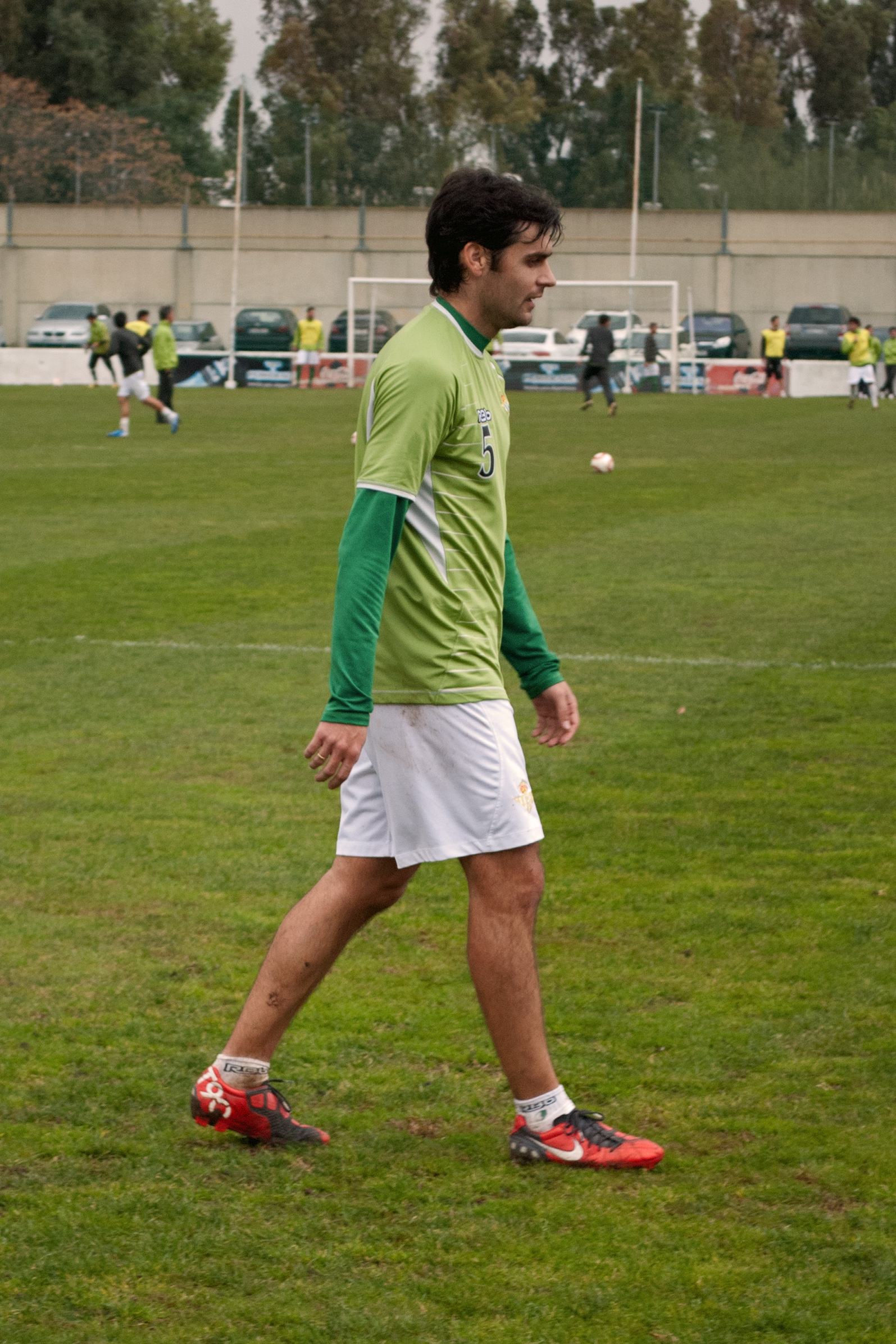 Chechu Dorado futbolista del Real Betis Balompié, durante un entrenamiento.